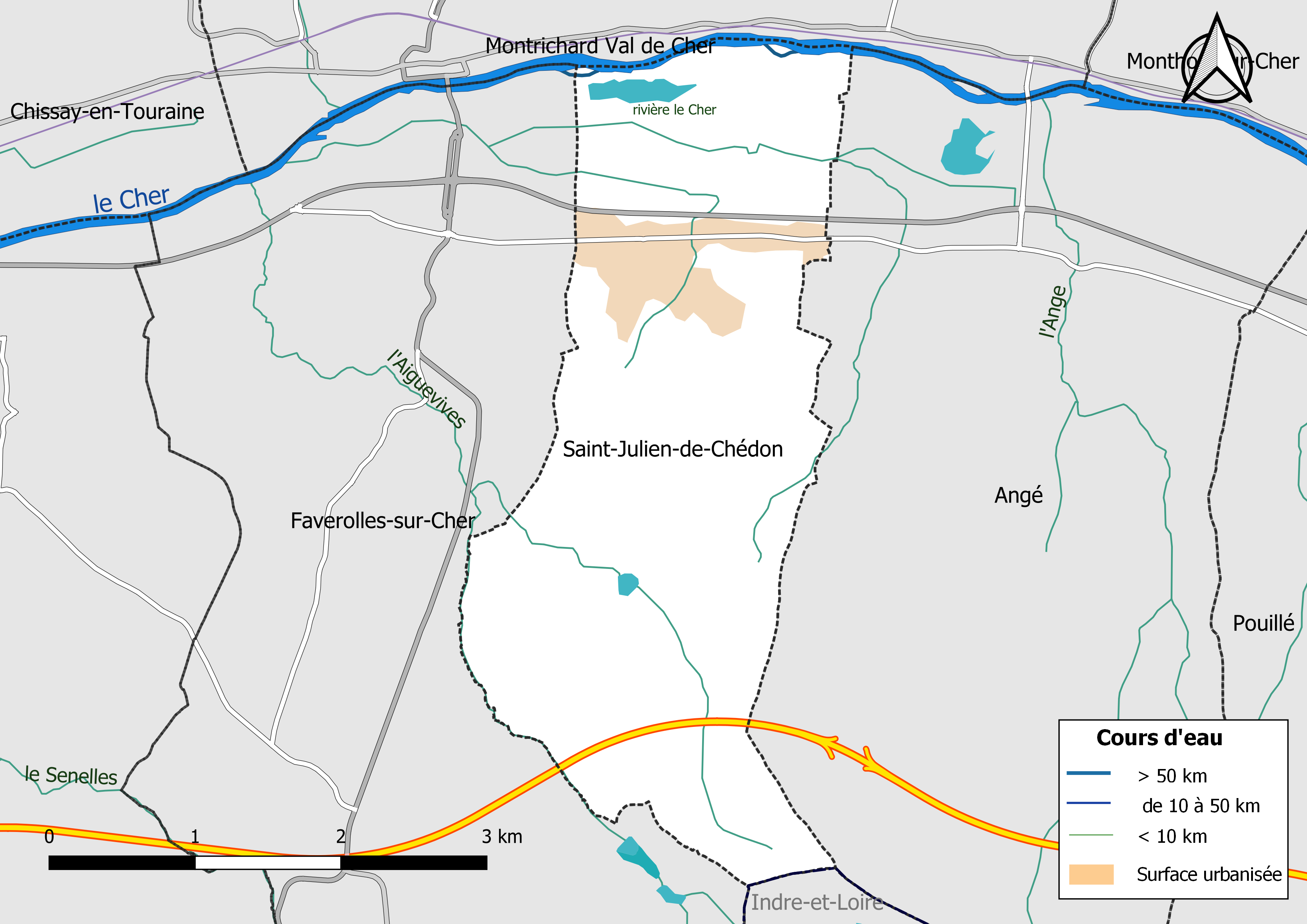 Carte du réseau hydrographique de la commune de Saint-Julien-de-Chédon (Loir-et-Cher, France).